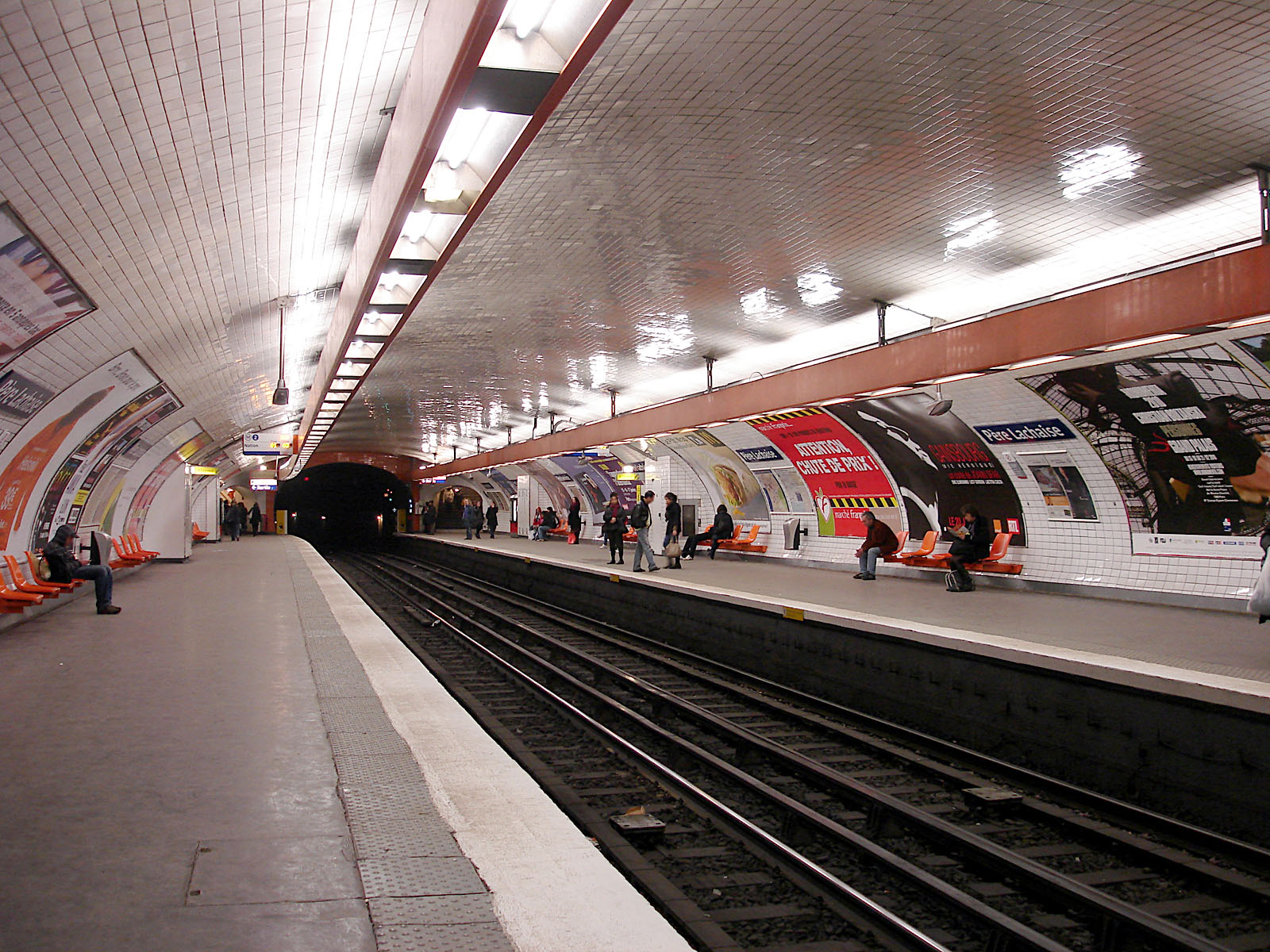 La station Père Lachaise de la ligne 2 du métro de Paris, France.